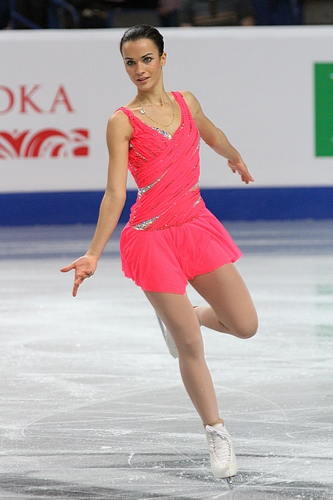 Мириам Леенбергер (Швейцария) на чемпионате Европы 2012 года.